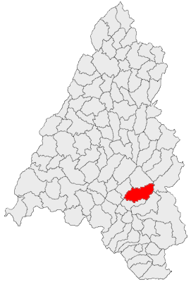 Categorie:Hărţi ale judeţului Bihor